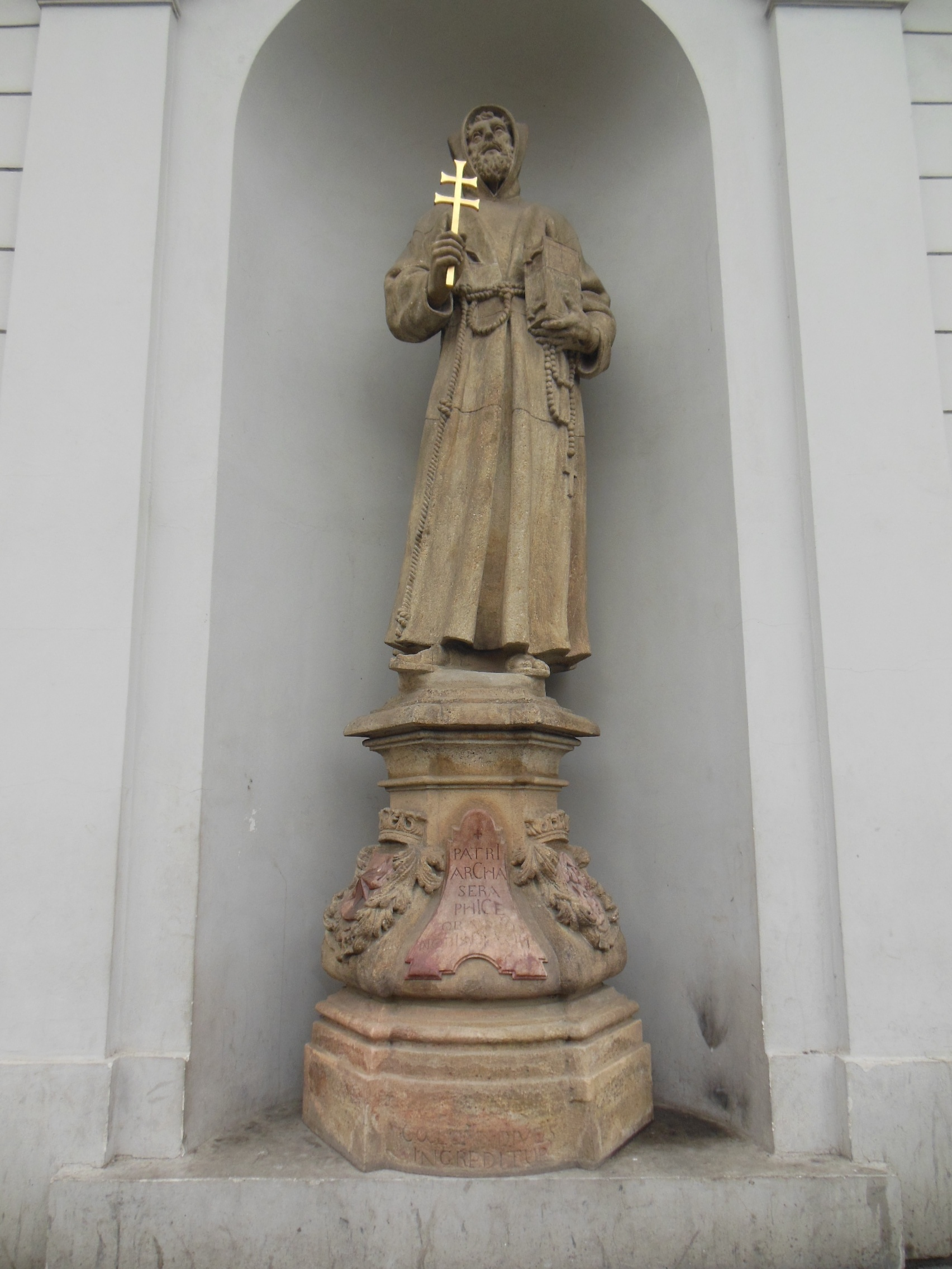 Socha poblíž kostela svatého Josefa na náměstí Republiky v Praze.